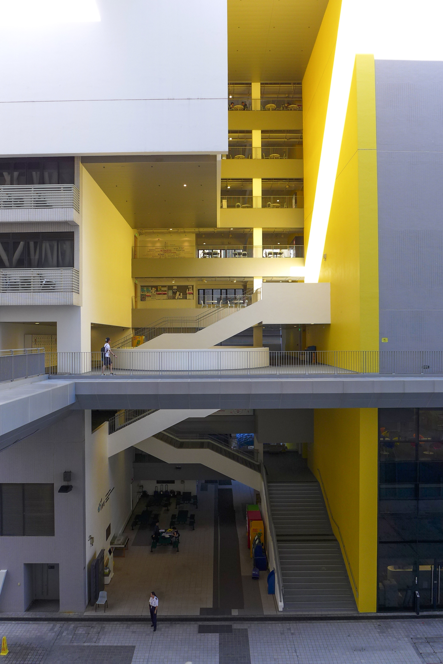 LWL Campus